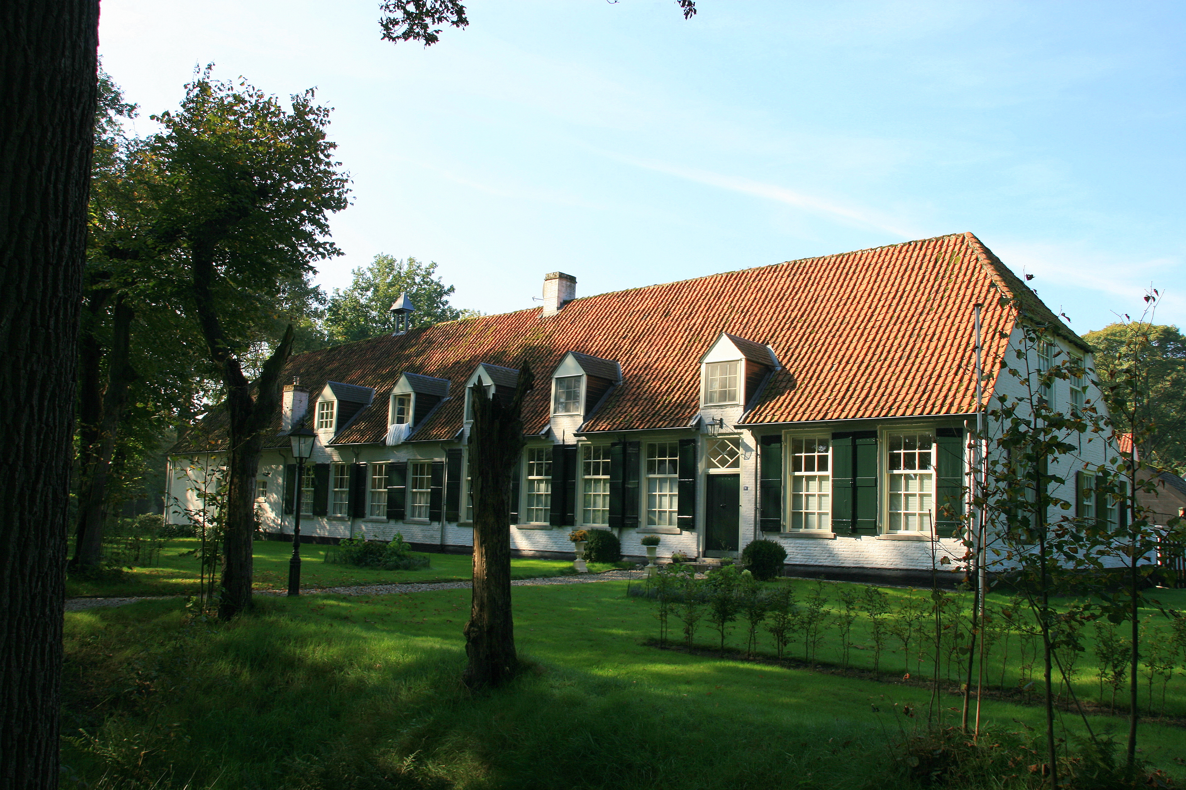 Het huis bestaat uit enkele woon- en bedrijfsgebouwen en muren rond een rechthoekige binnenplaats. De buitenplaats is door middel van enkele grote en kleine poorten ontsloten. Het pand is gezien de verhoudingen van de schuifvensters gebouwd in de tweede helft van de achttiende eeuw, mogelijk deels met gebruikmaking van oude bakstenen.